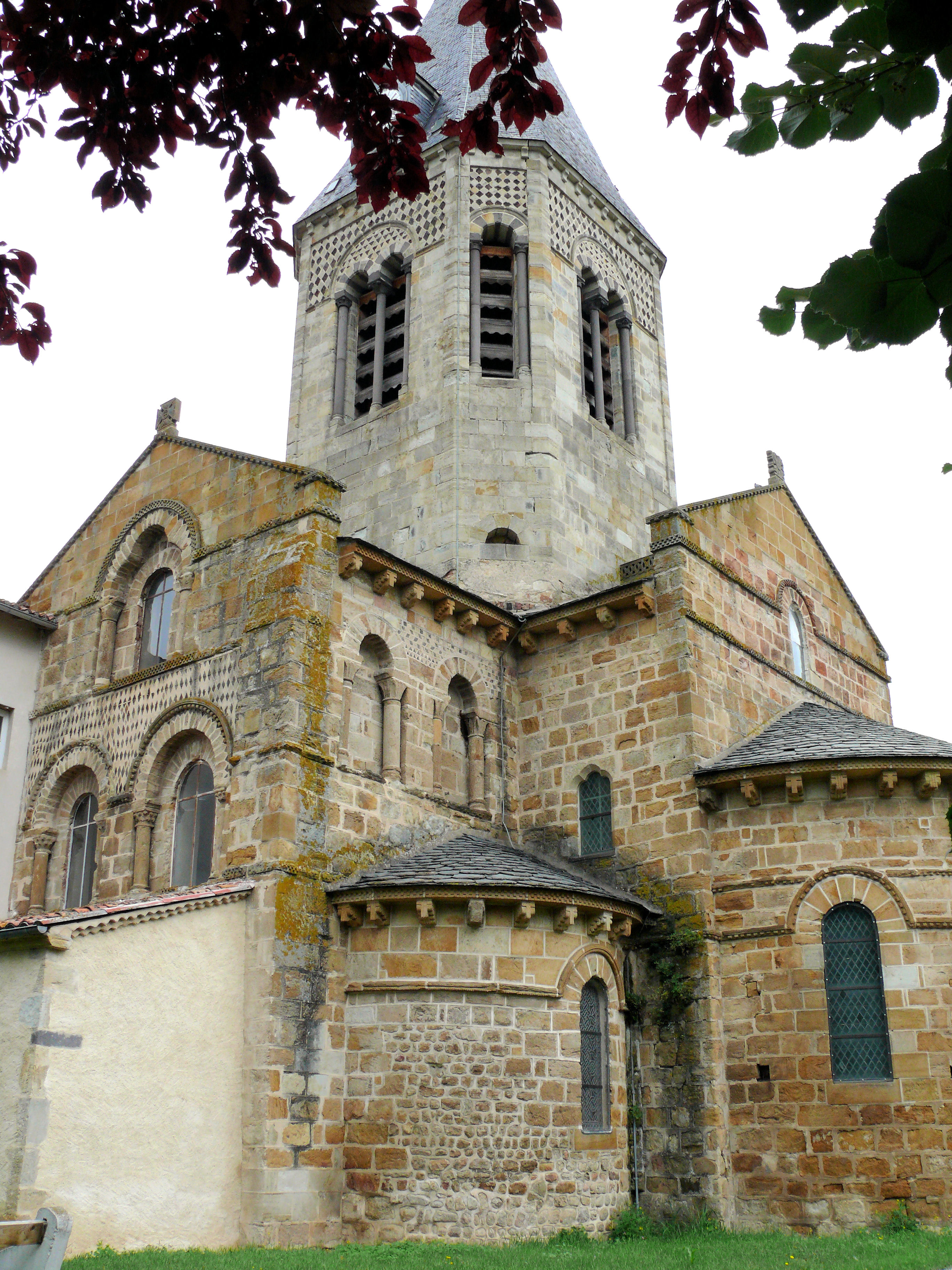 Culhat - Eglise Notre-Dame